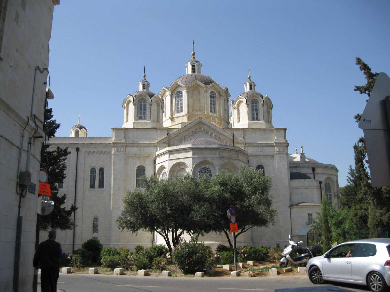 קתדרלת השילוש הקדוש היא קתדרלה רוסית במגרש הרוסים. נבנתה על ידי "החברה הארץ-ישראלית הרוסית-אורתודוקסית הקיסרית" שפעלה בירושלים בתקופה העות'מאנית. הכנסייה בנויה מאבן לבנה ולה שמונה מגדלים שבסופם כיפות צבועות בירוק ומצופות נחושת שעליהן צלב. This is a photo of a heritage building in Israel. Its ID is 2-3000-533